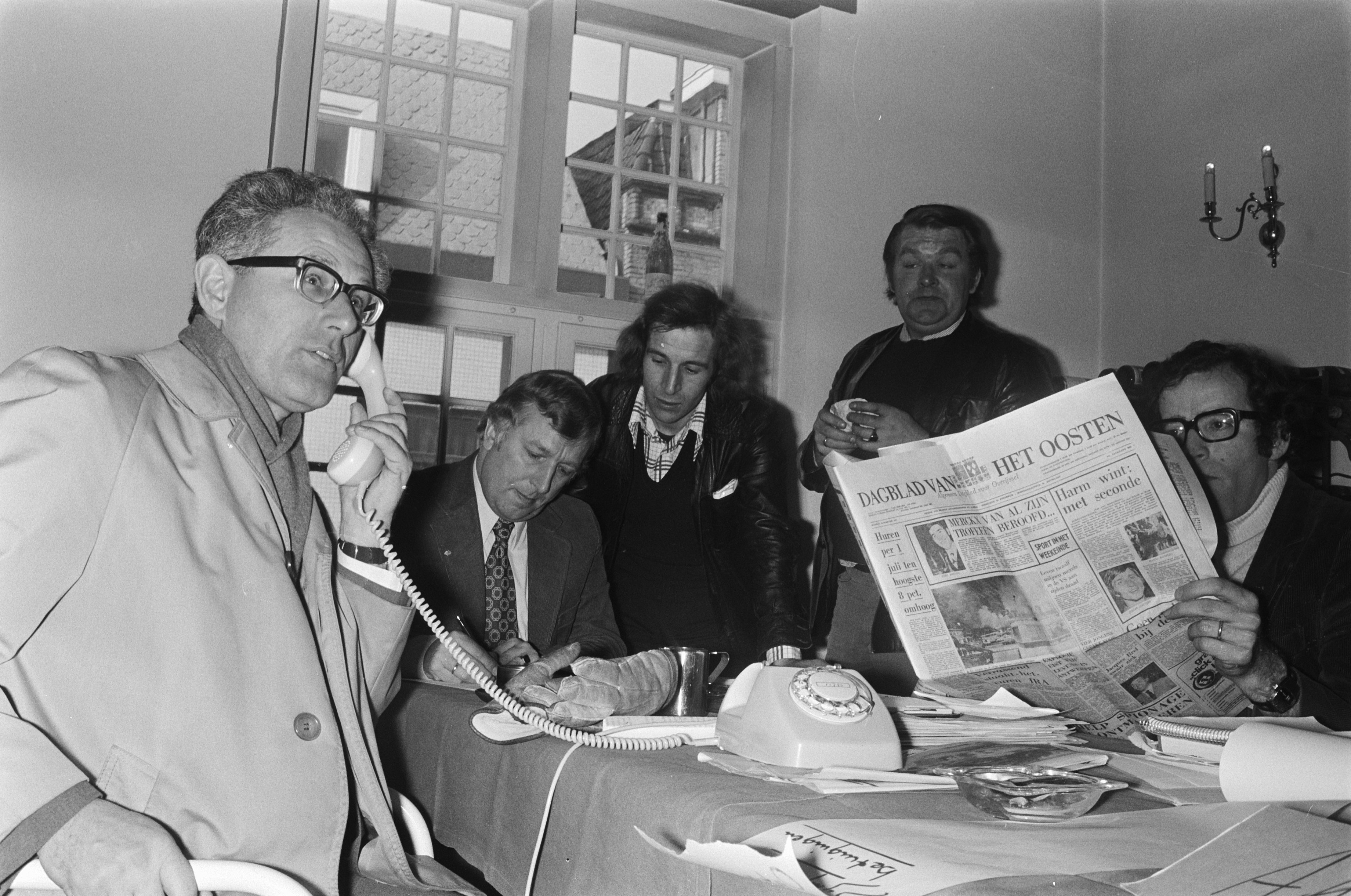 Collectie / Archief : Fotocollectie Anefo Reportage / Serie : [ onbekend ] Beschrijving : Redactie Dagblad van het Oosten staakt en demonstreert Almelo; stakende redacteuren in informatiecentrum Houwaart Datum : 17 februari 1975 Locatie : Almelo, Overijssel Trefwoorden : REDACTEUREN, stakingen Persoonsnaam : Dagblad van het Oosten Fotograaf : Bogaerts, Rob / Anefo Auteursrechthebbende : Nationaal Archief Materiaalsoort : Negatief (zwart/wit) Nummer archiefinventaris : bekijk toegang 2.24.01.05 Bestanddeelnummer : 927-7625